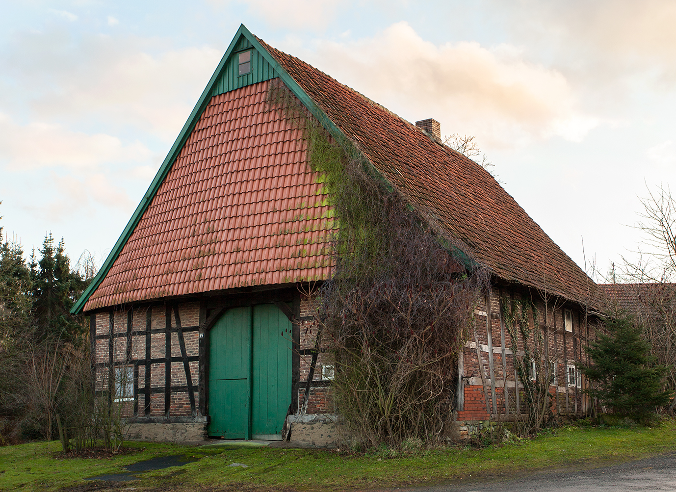 Nammen, Laurentiusstr. 14 This is a photograph of an architectural monument.